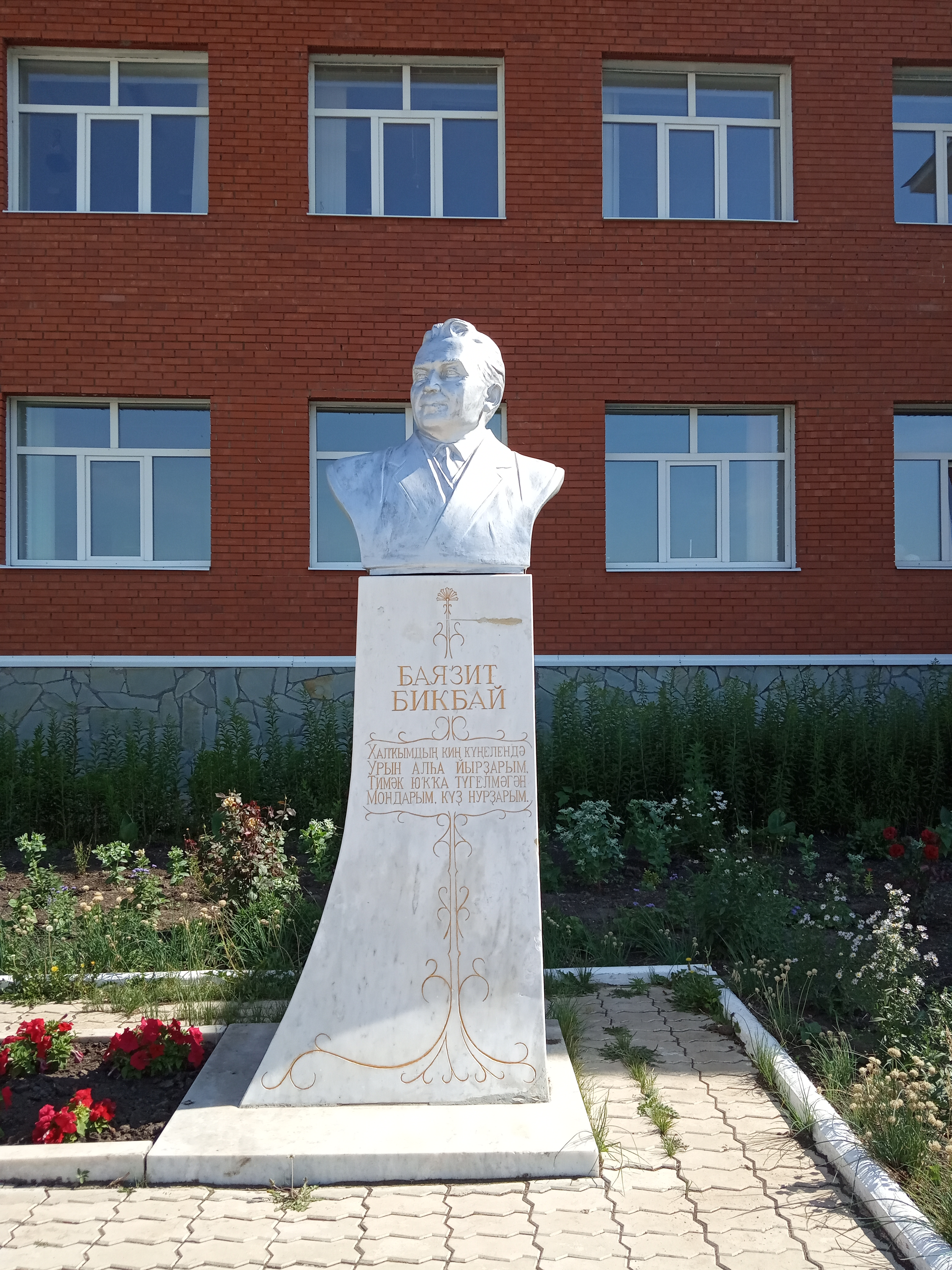 Башҡортса: Мораптал дөйөм белем биреү учреждениеһы